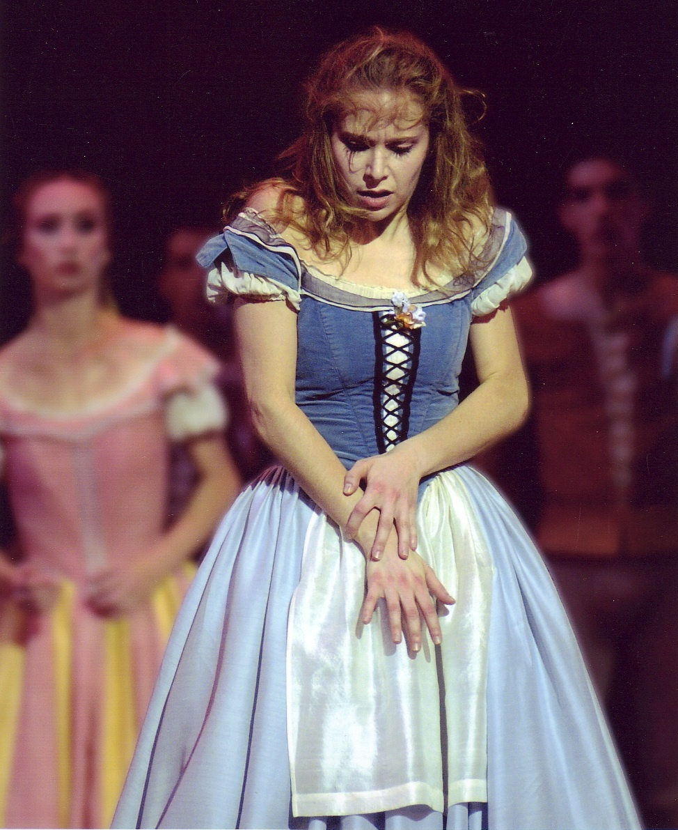 Giselle Opera national de Paris